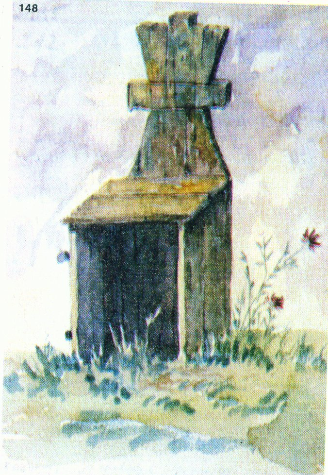 148. Кръст-кукла с ковчег, изработен преди 20-30 години от борова дъска; главата на куклата е трапецовидна; горният й край завършва с шапчица; вместо шийка куклата има две крила, които й придават формата на кръст. Размери: 60x22x25 см. Намерена из калугерските гробища в Гложенския манастир „Св. Георги", Тетевенско. Скицирана през юли 1916 г. (Т. 2, обр. 71.)